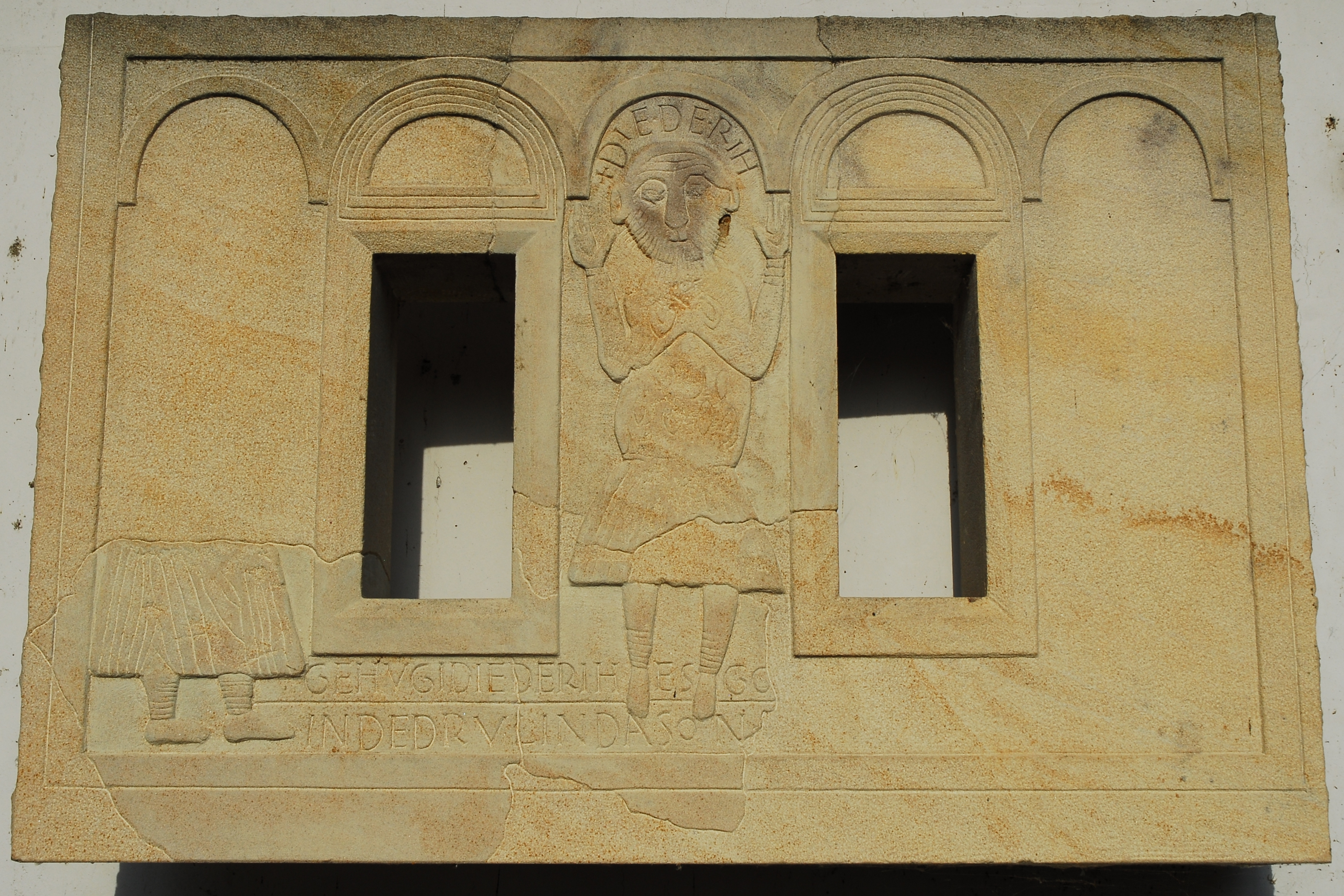 Nachbildung der sogenannten Binger Inschrift (BI) oder „Diederih-Stein, Grabstein des Dietrich“. Frühmittelalterliche althochdeutsche christliche Grabinschrift, durch „Diederih“ gestiftet. 1900 in Bingen gefunden, stammt aus der Zeit Ende des 10. Jahrhunderts (975–1000). Einziges erhaltenes volkssprachiges epigraphisches Zeugnis des Althochdeutschen. Zählt als Realie zum Korpus der althochdeutschen Literatur. Die auf dem Foto abgebildete Nachbildung befindet sich öffentlich zugänglich an der Außenwand eines Parkhauses in der Pfarrhofstraße, Bingen. Das Original befindet sich im Landesmuseum Mainz.